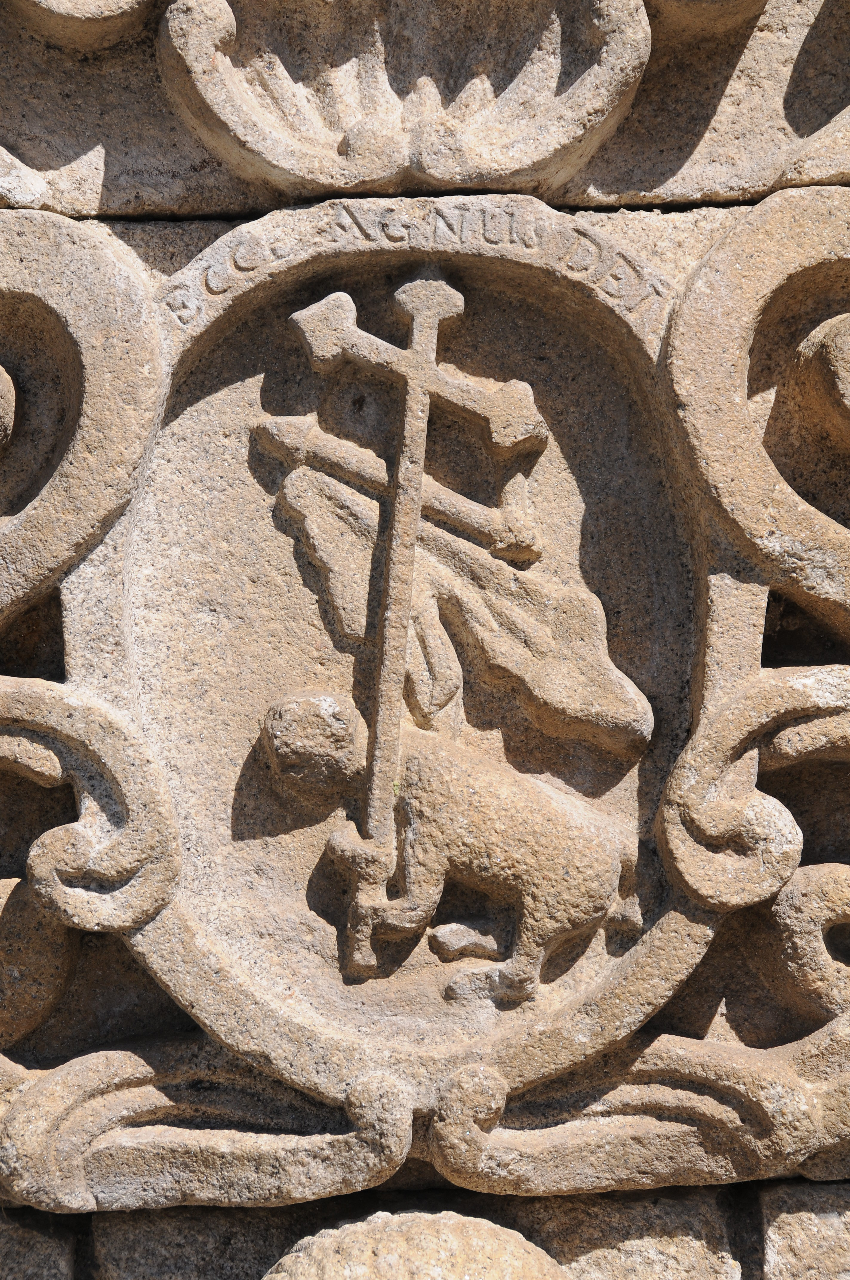 Relief in Sao Joao Fountain, Melgaco, Portugal